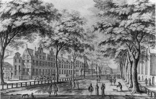 Den Haag, Lange Voorhout anno 1689